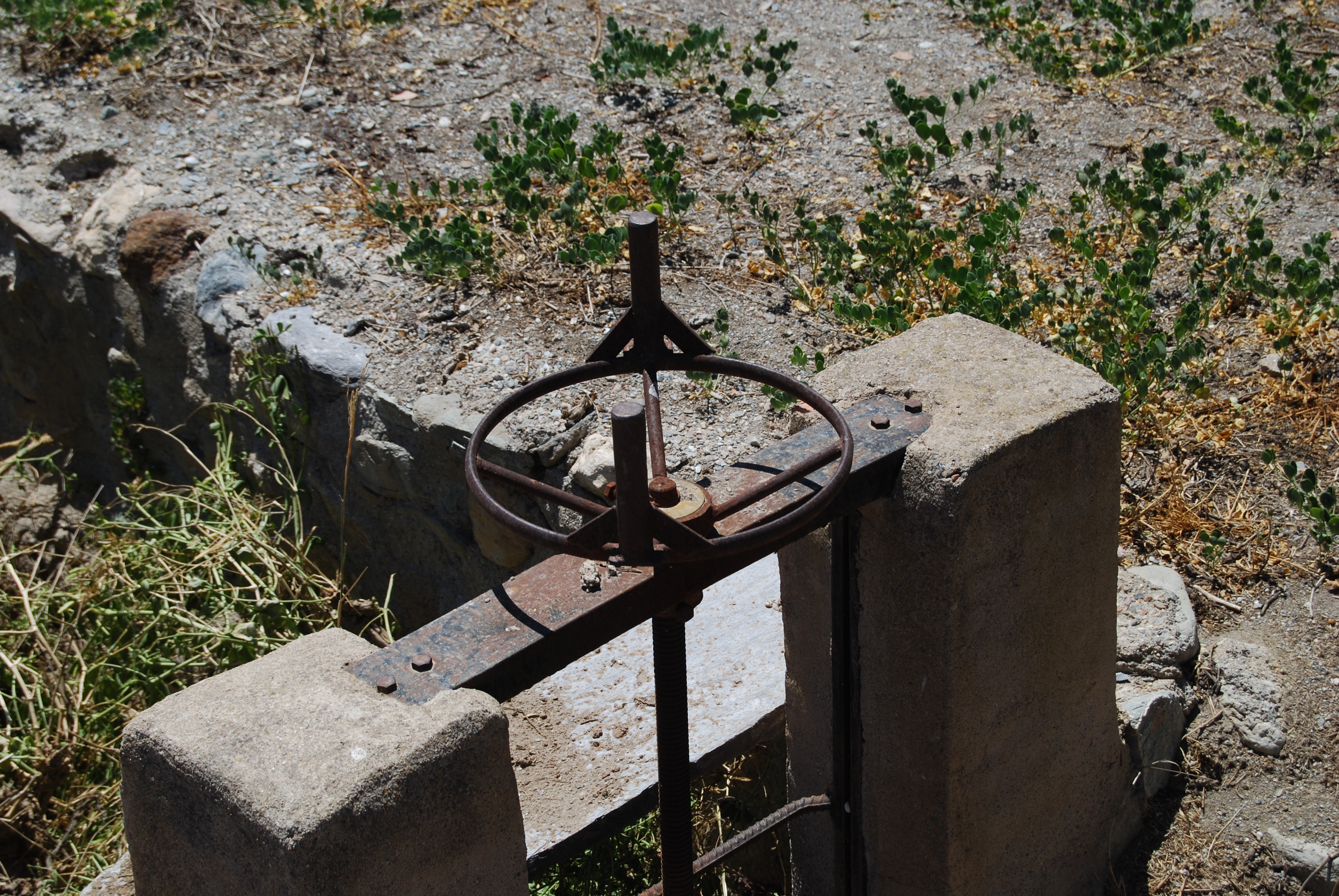 Vista de un partidor